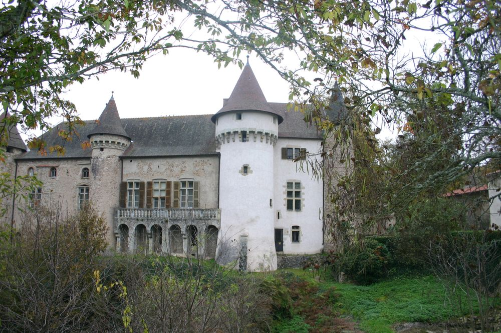 Château d'Aulteribe (Puy-de-Dôme)